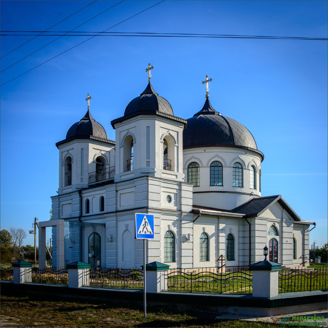 Свято-Троїцька церква. Великі Будища. Велотур"Гадяч - Полтава"